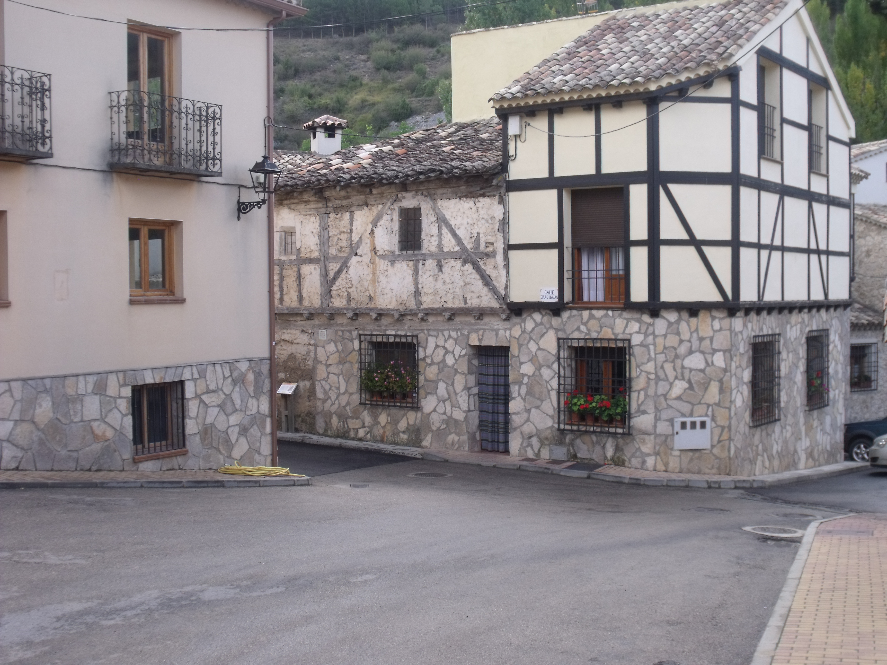 Palomera.